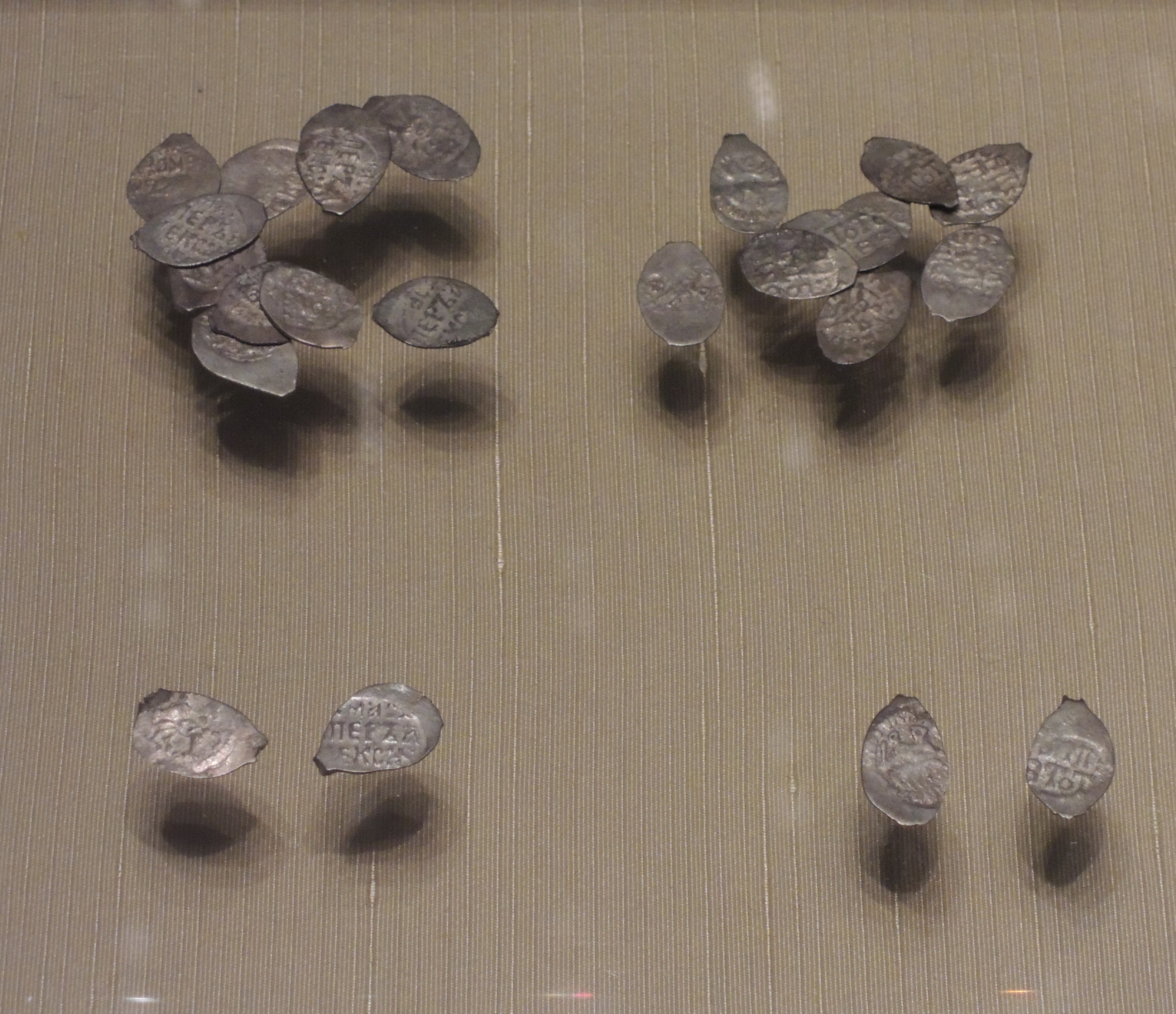 Слева: Денга Московская. Москва, 1480-е. Мастер Александро. Серебро, чеканка. ММК. Справа: Денга Московская. Москва, 1480-е. Серебро, чеканка. ММК. На оборотной стороне денги латинская надпись готическим шрифтом oRNISToTELES, которую некоторые иследователи связывают с именем Аристотеля Фиораванти. Они отмечают изображение цветка под ногами коня, как "говорящий" символ, передающий дословно его фамилию "цветок, гонимый ветром". Выставка "Великий князь и государь всея Руси Иван III"